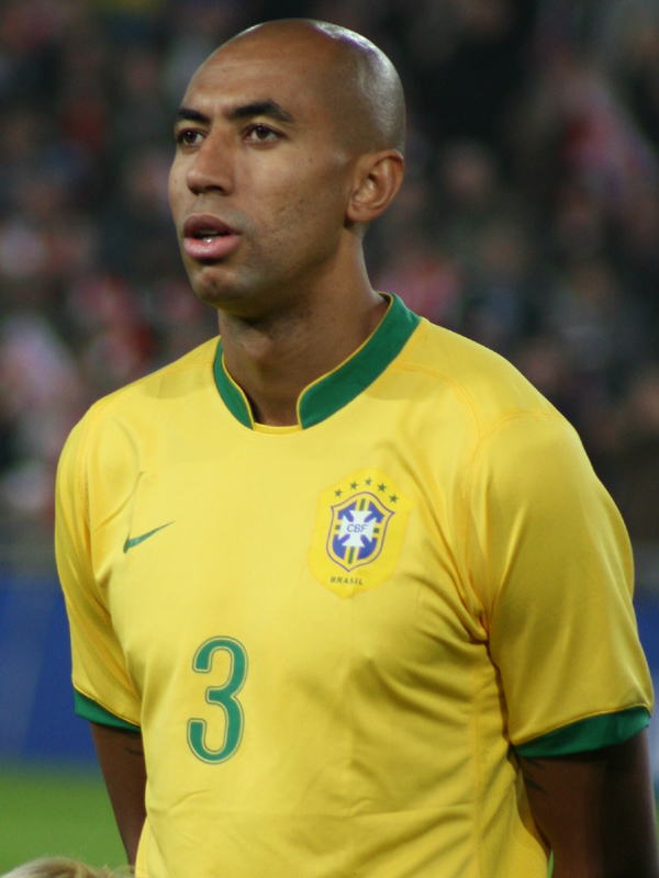 Luisão, St. Jakob Stadion, Basel (Switzerland), Switzerland - Brasil 1:2